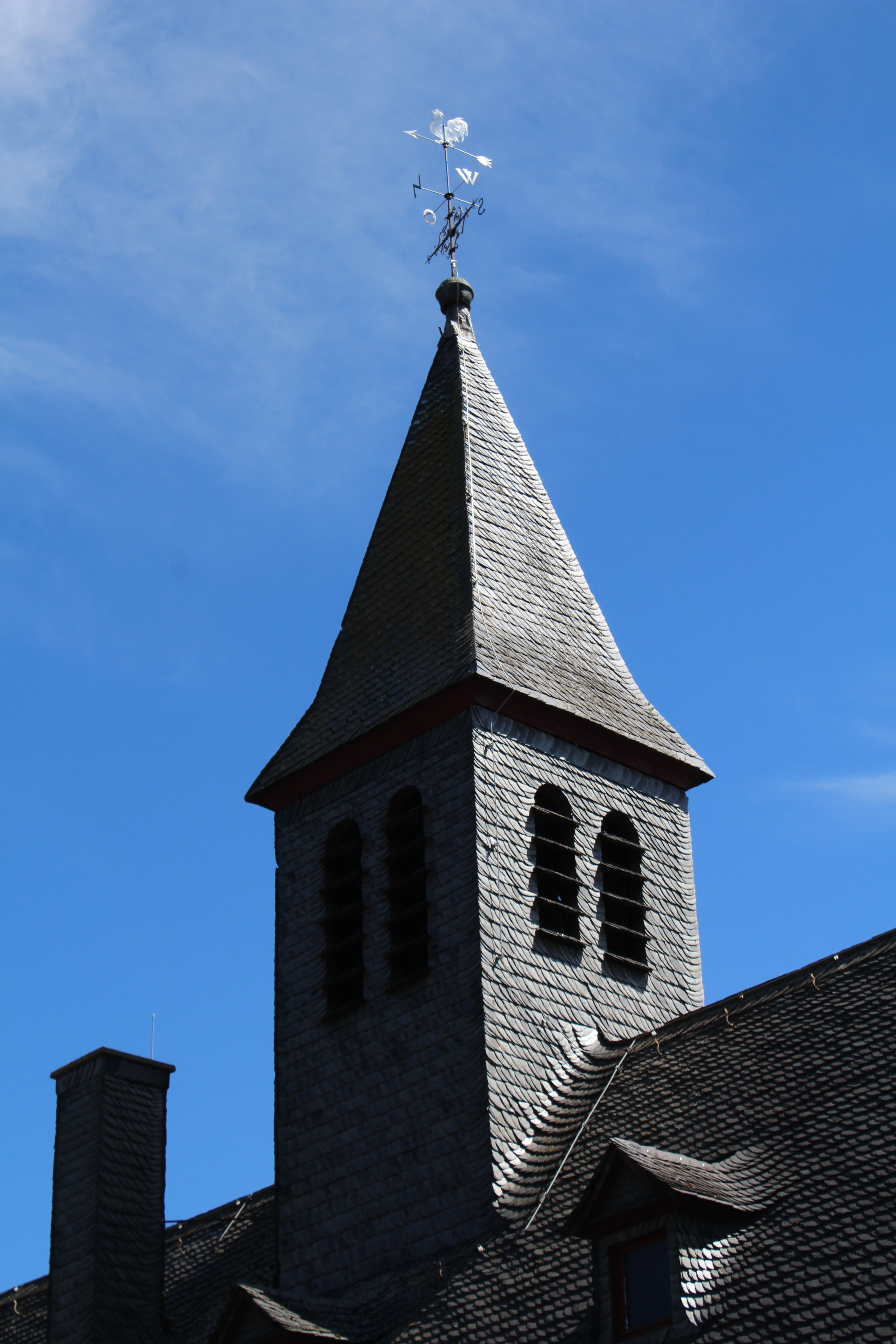 Evangelische Kirche Oberwetz, Gemeinde Schöffengrund, Hessen, Deutschland